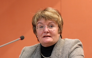 Dorothea Henzler im Rahmen einer Podiumsdiskussion 2009 in Bad Homburg